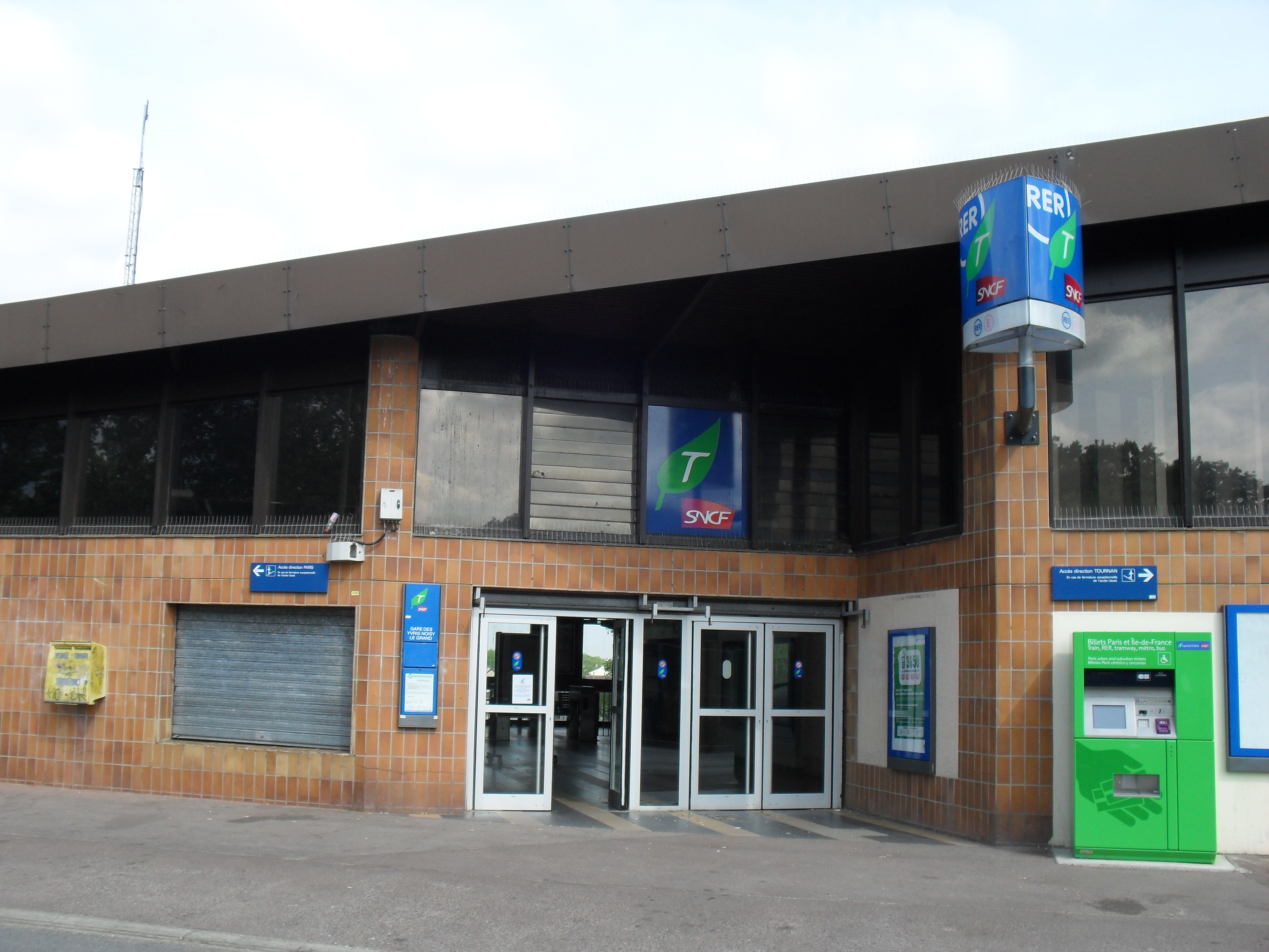 RER E - Gare des Yvris - Noisy-le-Grand